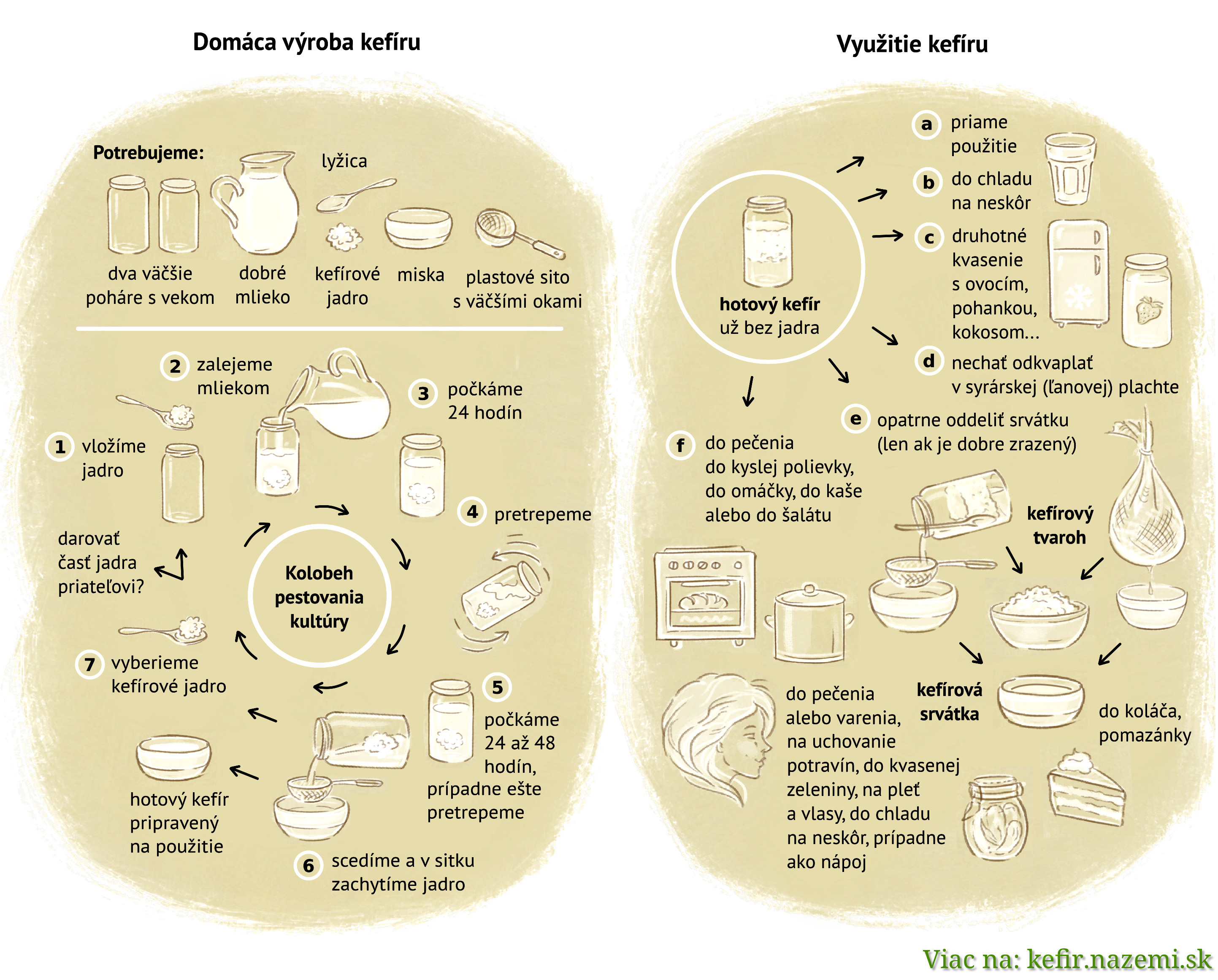 Na ľavej strane infografiky je návod na domácu výrobu mliečneho kefíru: potrebné pomôcky a vysvetlenie kolobehu práce. Na pravej strane sú zobrazené spôsoby využitia a spracovania kefíru: druhotné kvasenie, oddelenie srvátky a tvarohu a použitie do pečenia, na pleť, do kvasenej zeleniny či na výrobu syra.